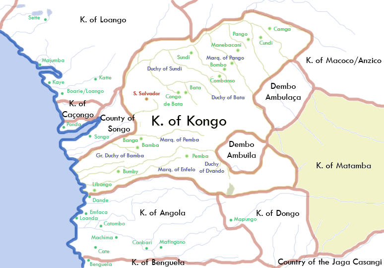 A partir de File:KingdomKongo1711.png